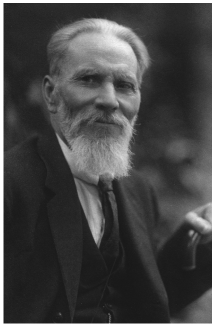 Егор Егорович Лазарев (псевдоним Бровинский; 12 апреля 1855, Самарская губерния — 23 сентября 1937, Прага) — народник, правый эсер, делегат Всероссийского Учредительного собрания, министр просвещения КОМУЧа, политэмигрант, редактор, автор мемуаров.